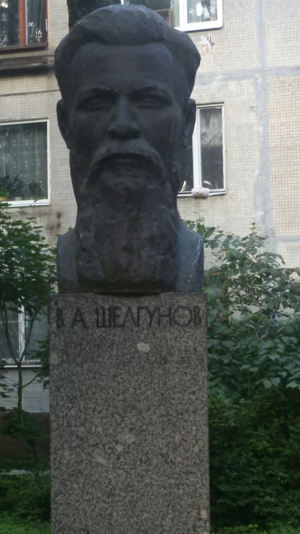 Бюст Василия Шелгунова у музея «Невская застава» работы Н. С. Кочукова